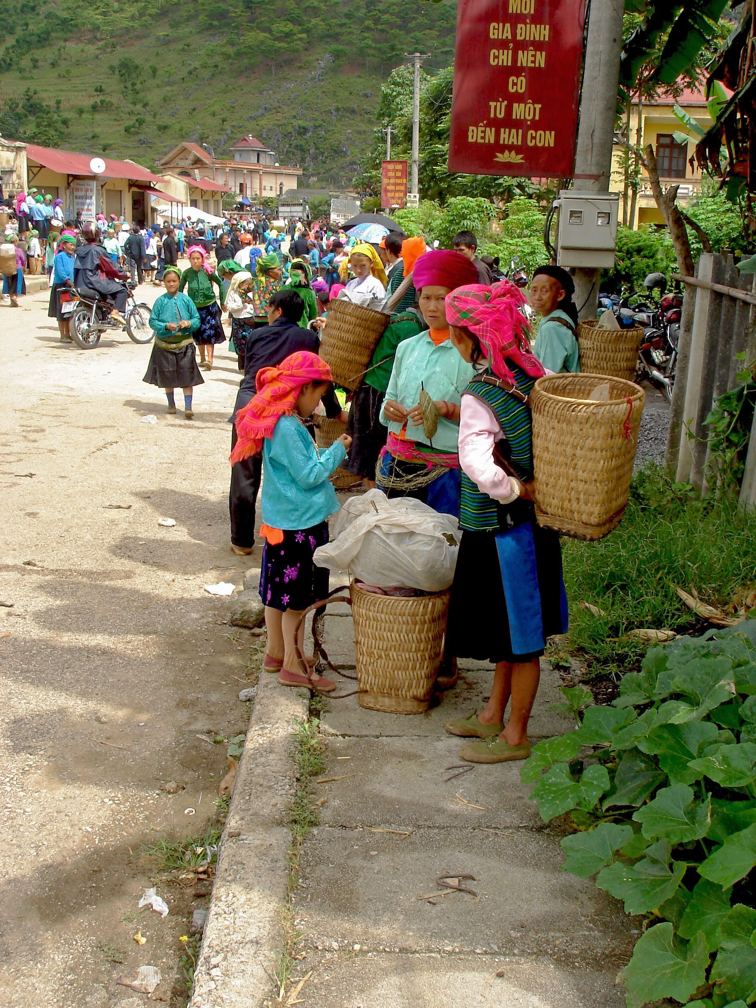 Marktteilnehmer